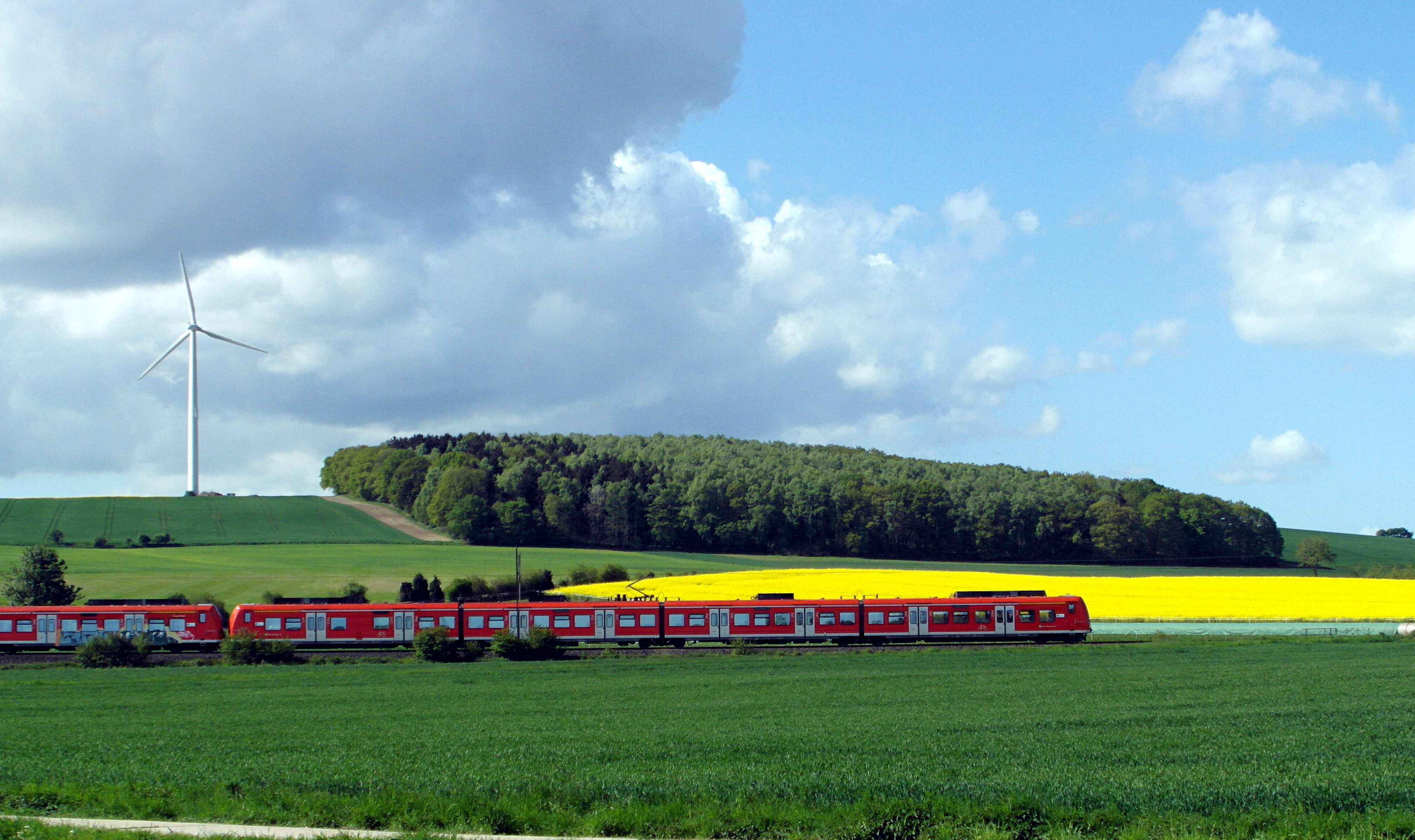 Vörier Berg im Landschaftsschutzgebiet LSG-H 00022 Landwehr - Süllberg. Im Vordergrund die Bahnstrecke Hannover-Hameln